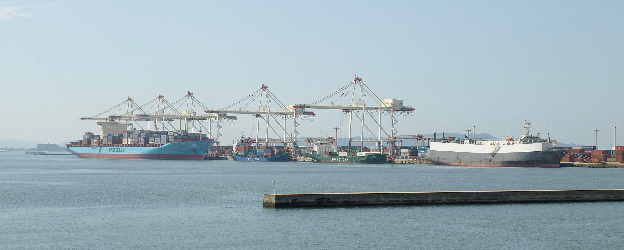 アイランドシティのコンテナターミナル（香椎アイランドブリッジより撮影）